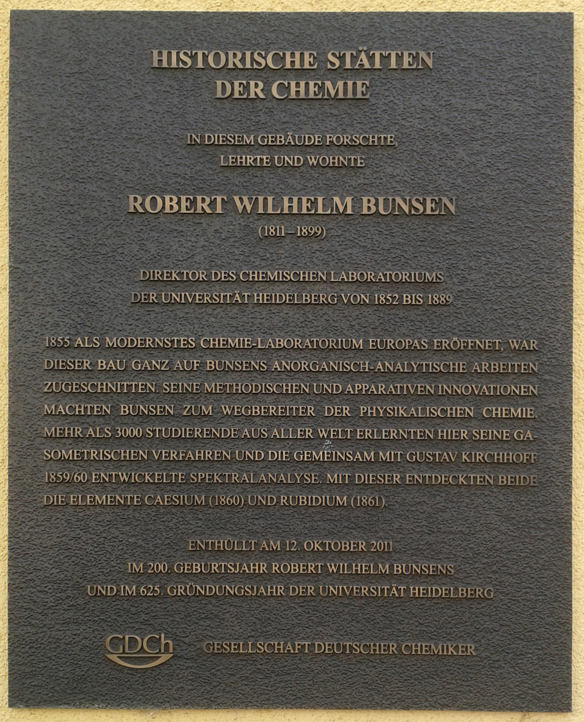 Historische Stätten der Chemie - Robert Wilhelm Bunsen, Akademiestraße/Plöck, Heidelberg